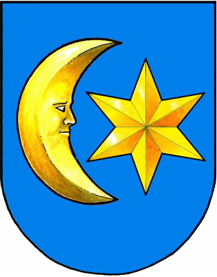 Das Wappen der ehemaligen Marktgemeinde Gries, goldene Stern mit einer goldenen Mondsichel auf blauem Untergrund.